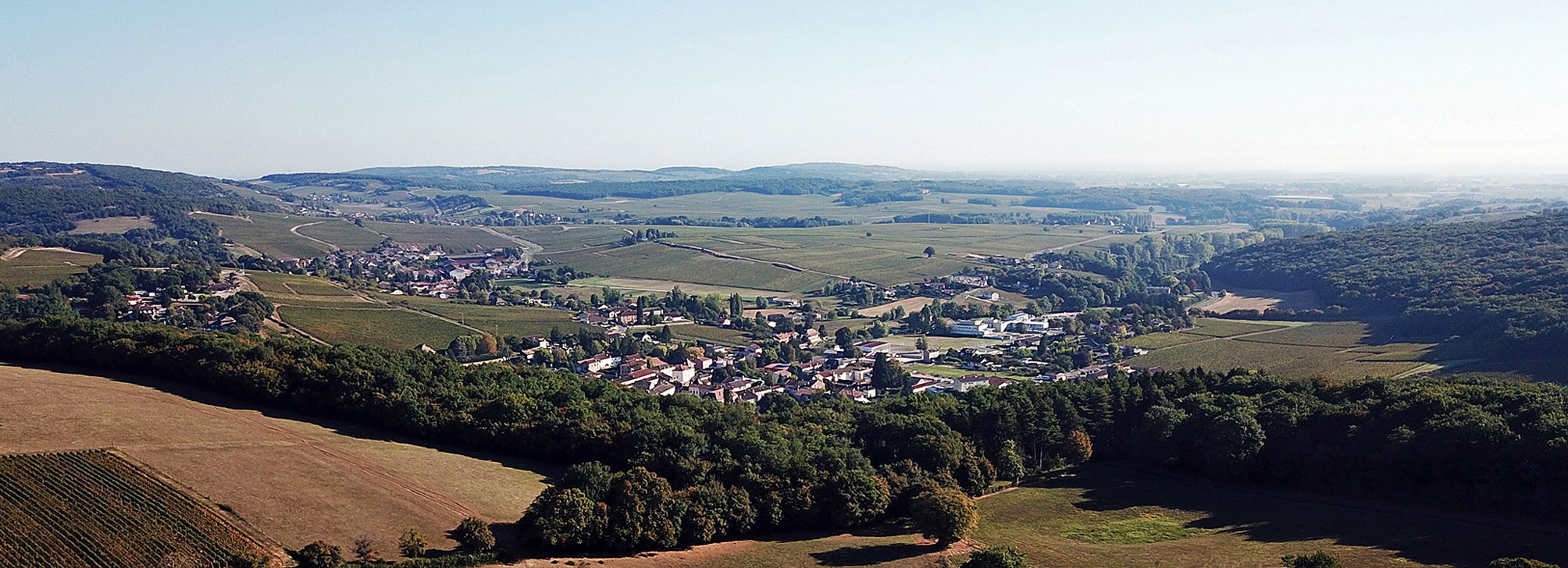 Vue aérienne panoramique de Lugny (2018)